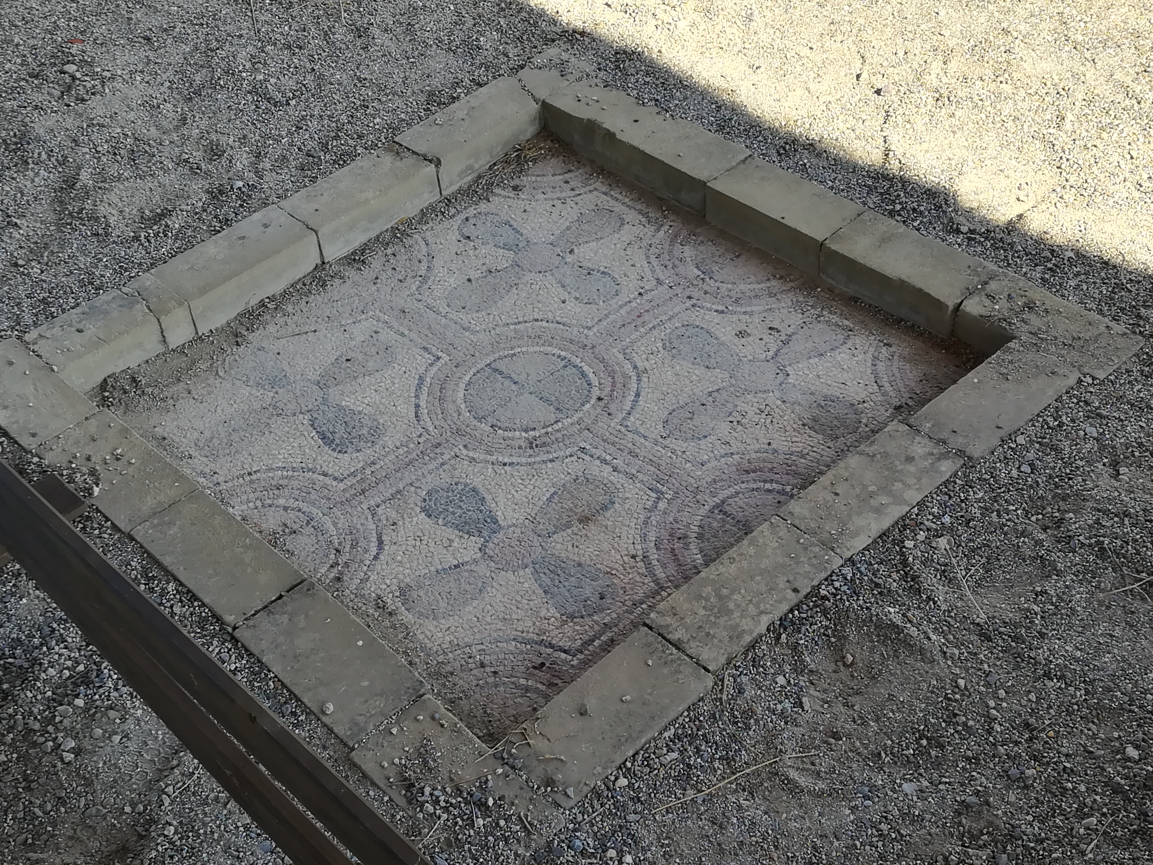 Aquesta foto ens mostra la part del mosaic de la galeria sud, tal i com la podem veure in situ si visitem la vil·la romana del romeral.